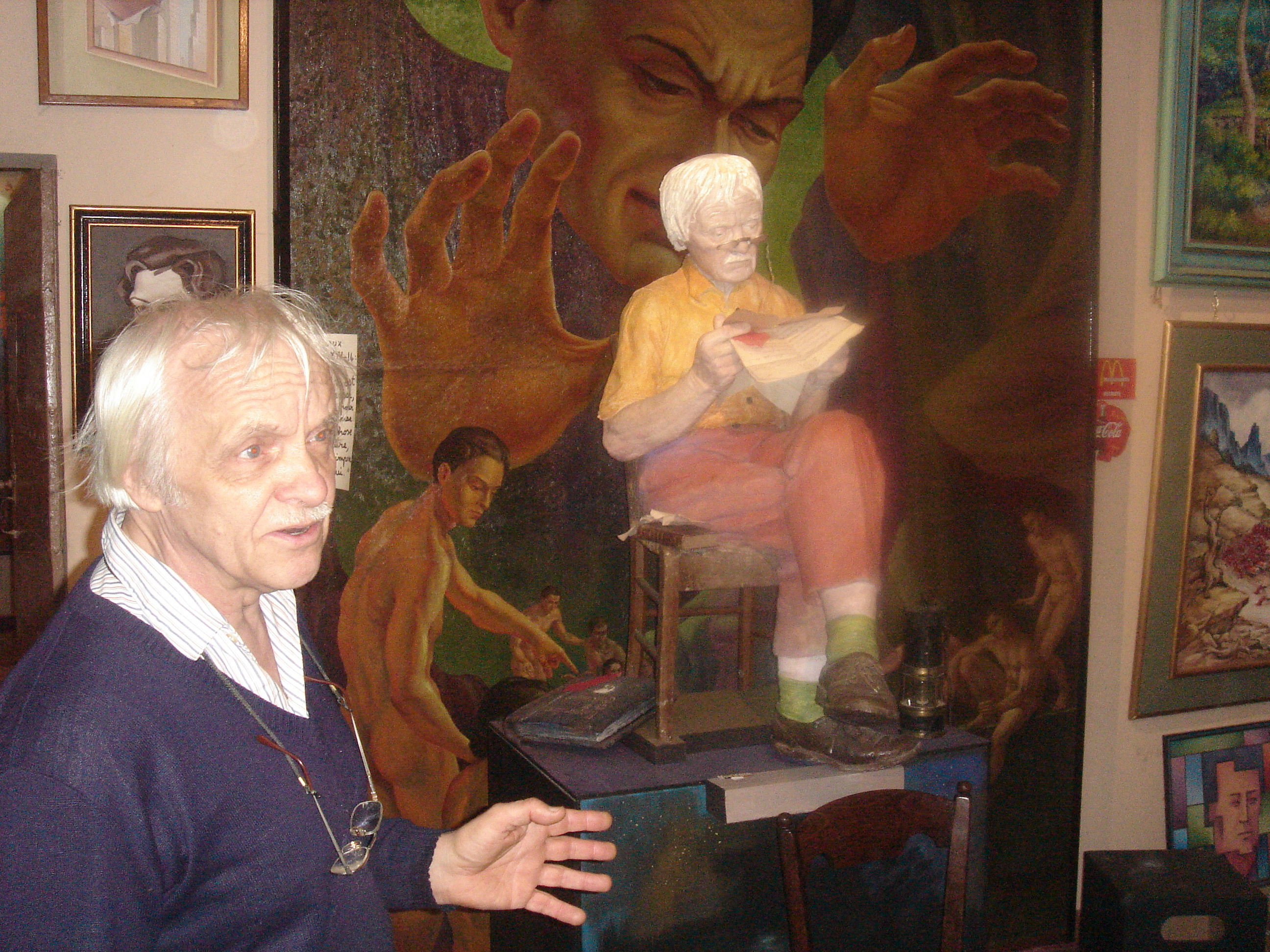 En 2019, dans un court-métrage de Sidney Beaucheron, Inspire, André Gonnet incarne, dans une allégorie de la création artistique, un personnage dont la statue, sculptée par Miguel Le Bacon, s'anime soudain puis joue du violoncelle, déployant tous son talent en harmonie avec la beauté naturelle d'un décor s'étendant à l'infini